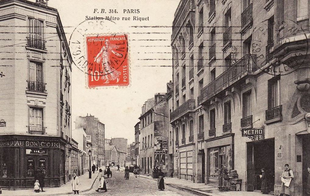 Rue Riquet, vue depuis l'avenue de Flandre, à Paris 19e, avec l'accès de la station de métro Riquet débouchant dans un immeuble, sur la droite.